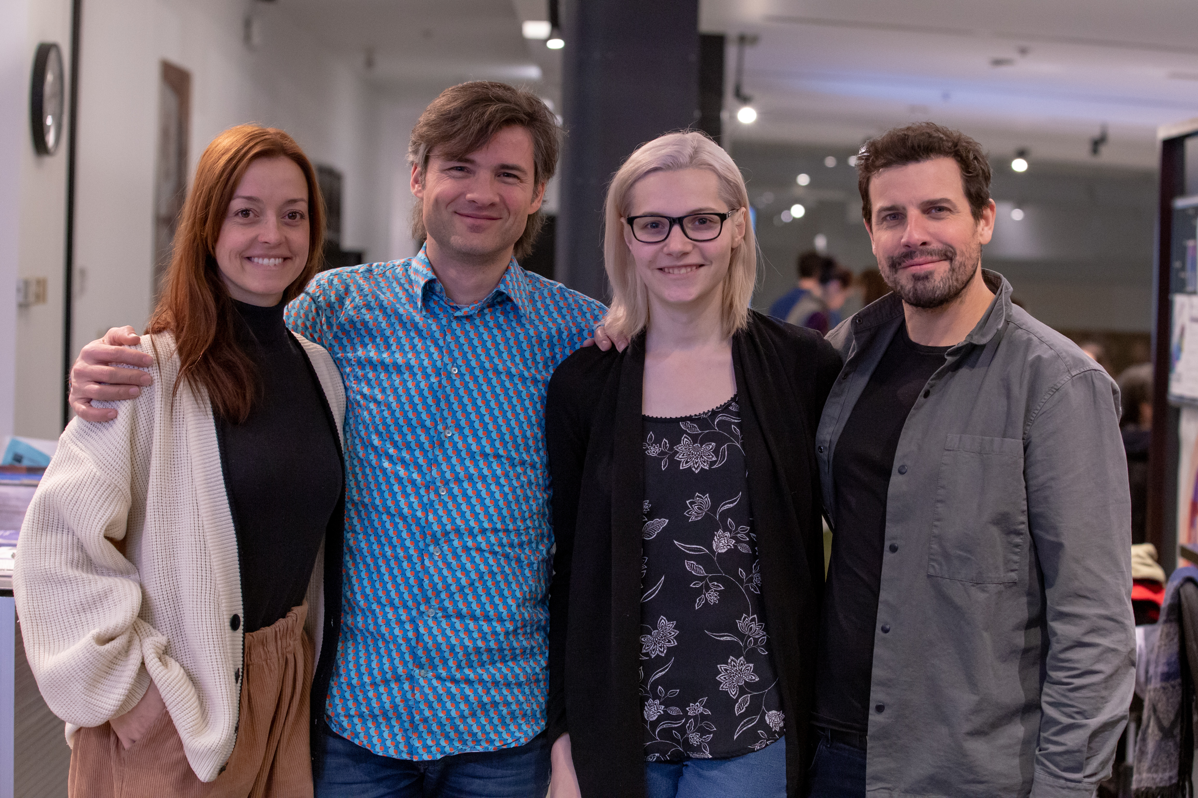 Photo de quatre membres de Kino Montréal. Photographie prise lors d'un atelier Wiki à la Cinémathèque québécoise. De gauche à droite : Isabelle Giroux (porte-parole), Jéricho Jeudy (cofondateur), Alice Bédard (programmatrice des projections mensuelles) et Christian Laurence (cofondateur).